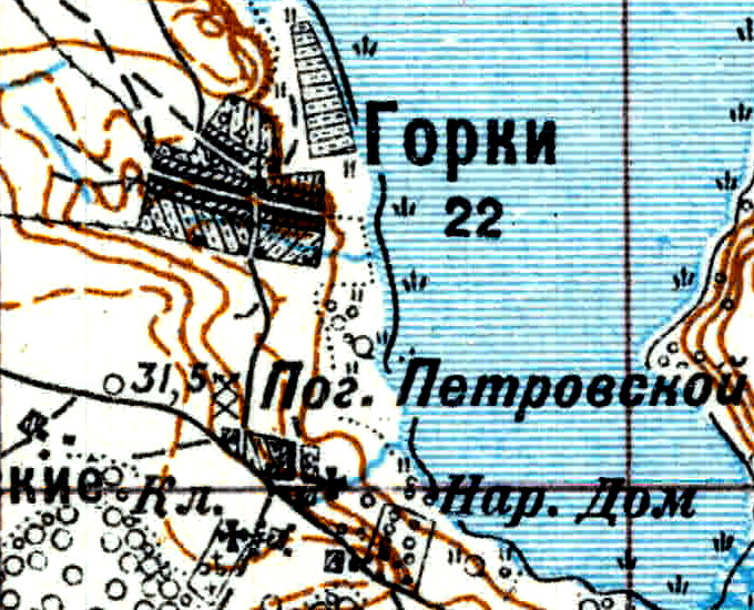 Топографическая карта Ленинградской области, квадрат Vc-29 (Батецкая), деревня Петровская Горка